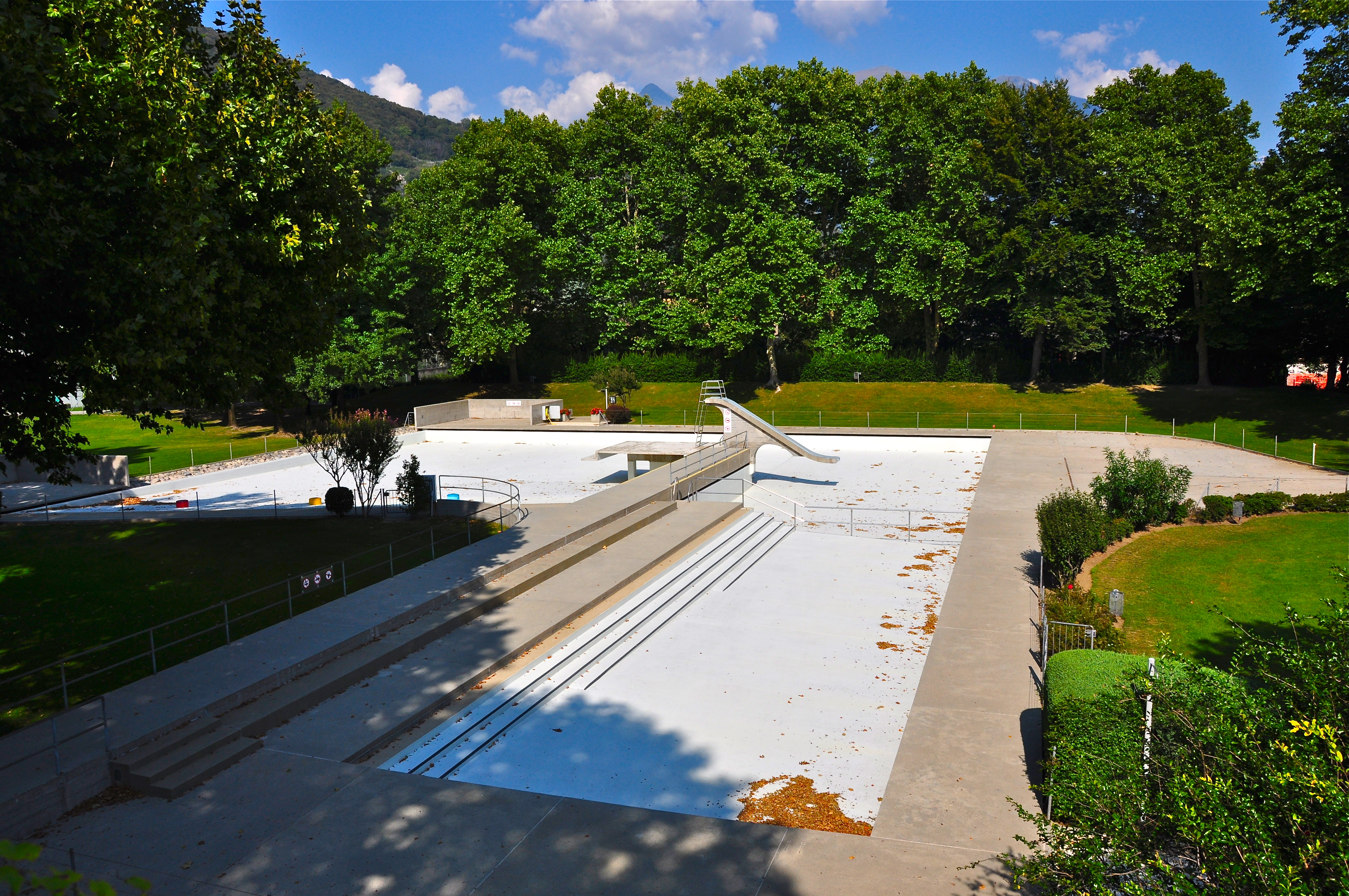 Vasca non nuotatori